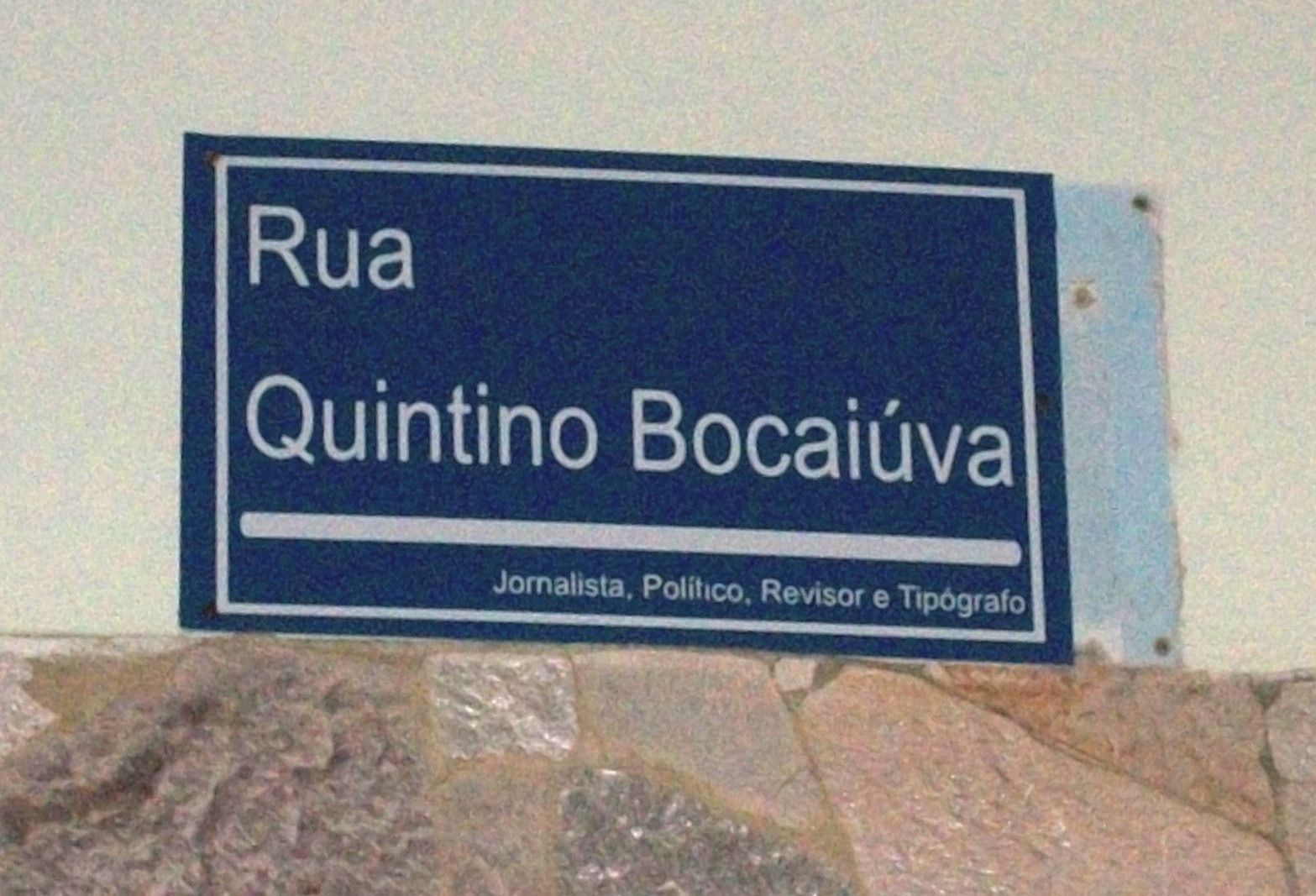 Placa da Rua Quintino Bocaiúva em Juiz de Fora, no bairro Jardim Glória.